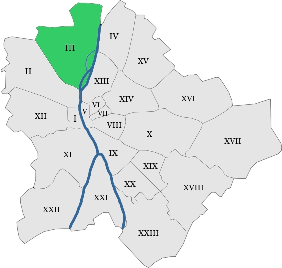 map hungary budapest district 3